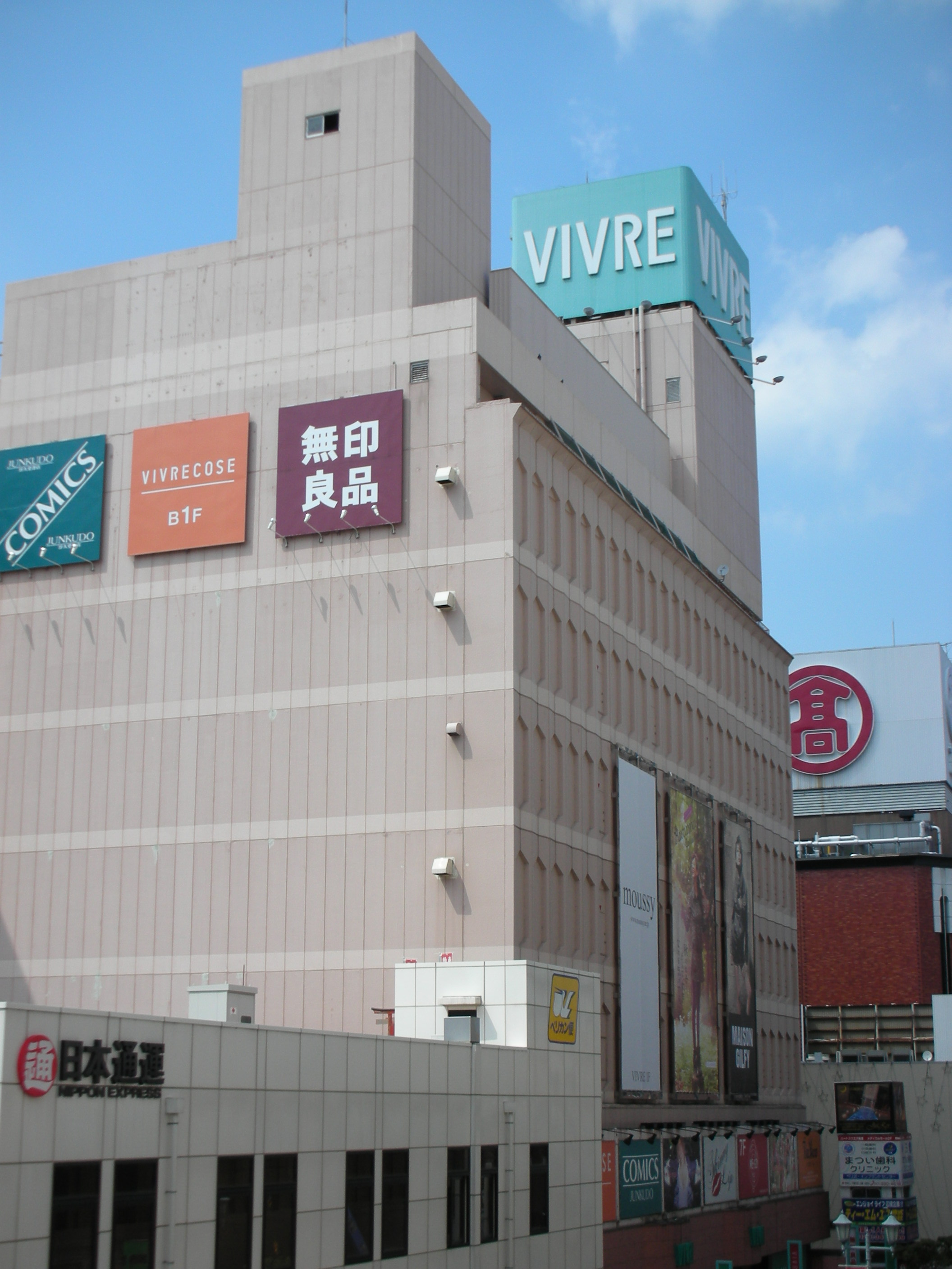 高崎ビブレの外観